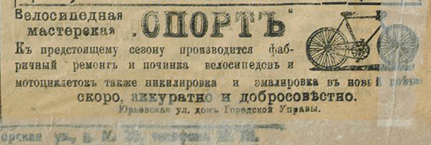 Текст на изображении: "Велосипедная мастерская СПОРТ. К предстоящему сезону производится фабричный ремонт и починка велосипедов и мотоциклов также никелировка и эмалировка. Скоро, аккуратно, добросовестно. Юрьевская улица, дом Городской Управы".